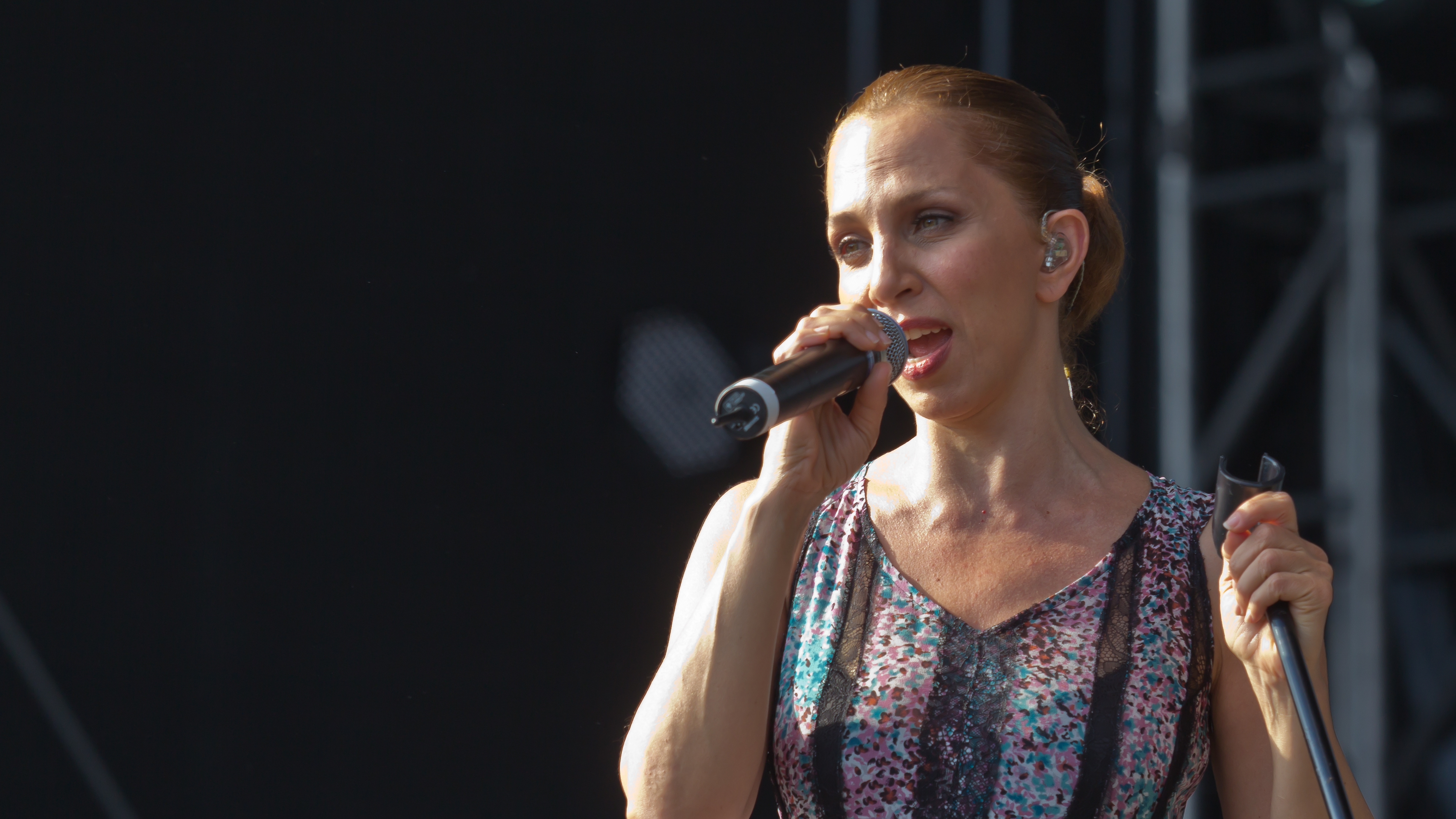 Birlikte - Kundgebung - Sertab Erener und Demir Demirkan Foto: Sertab Erener